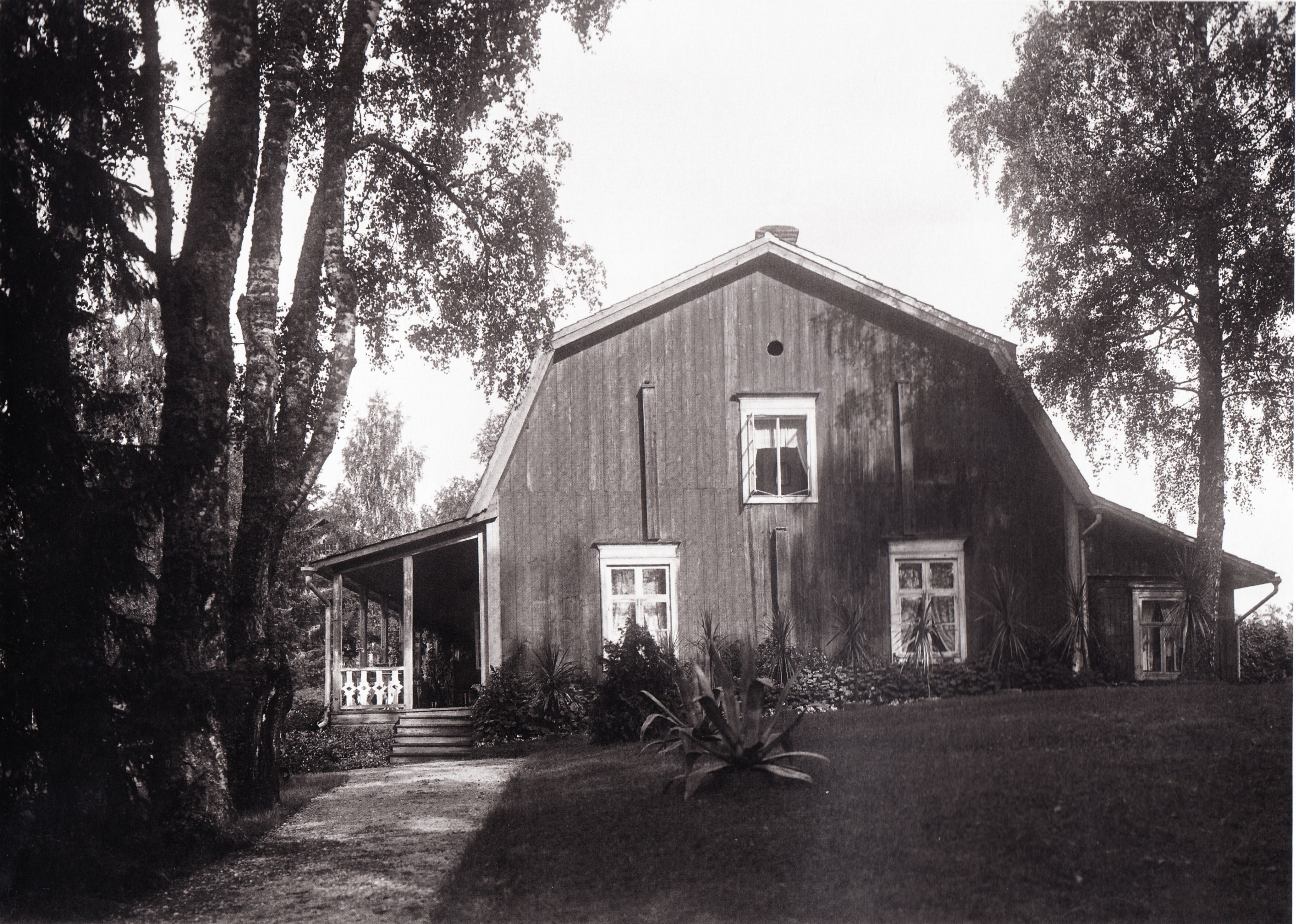 Linnaisten karftano